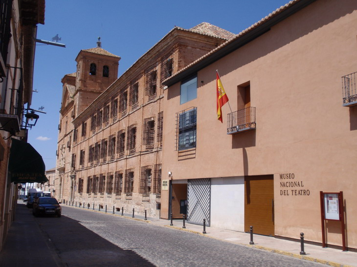 Almagro. Fachada del Museo del Teatro.